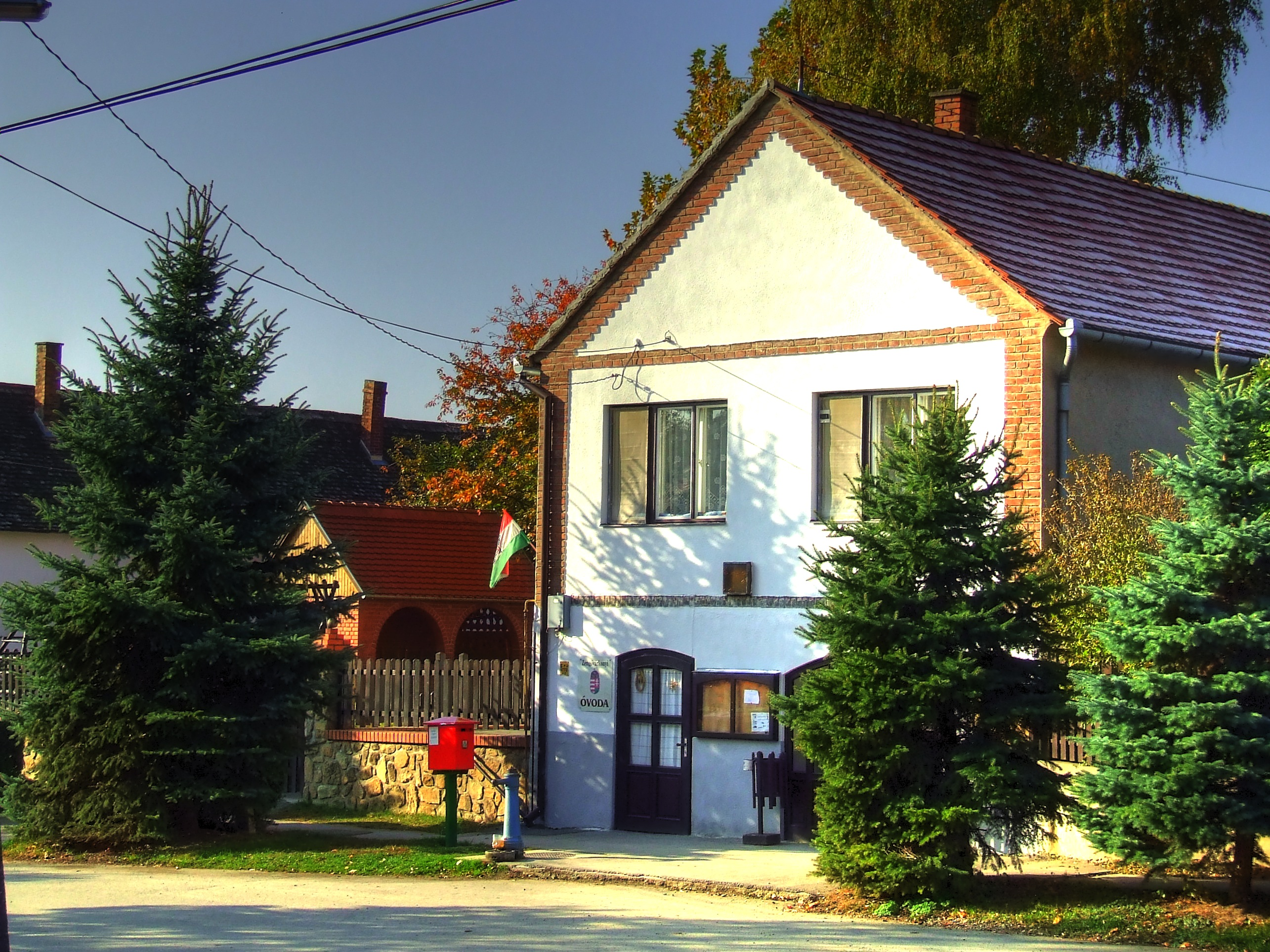 Zengővárkony - Óvoda